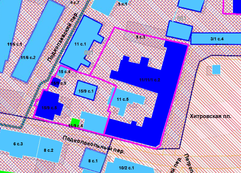 Охранная зона дома Ярошенко на Хитровской площади в Москве